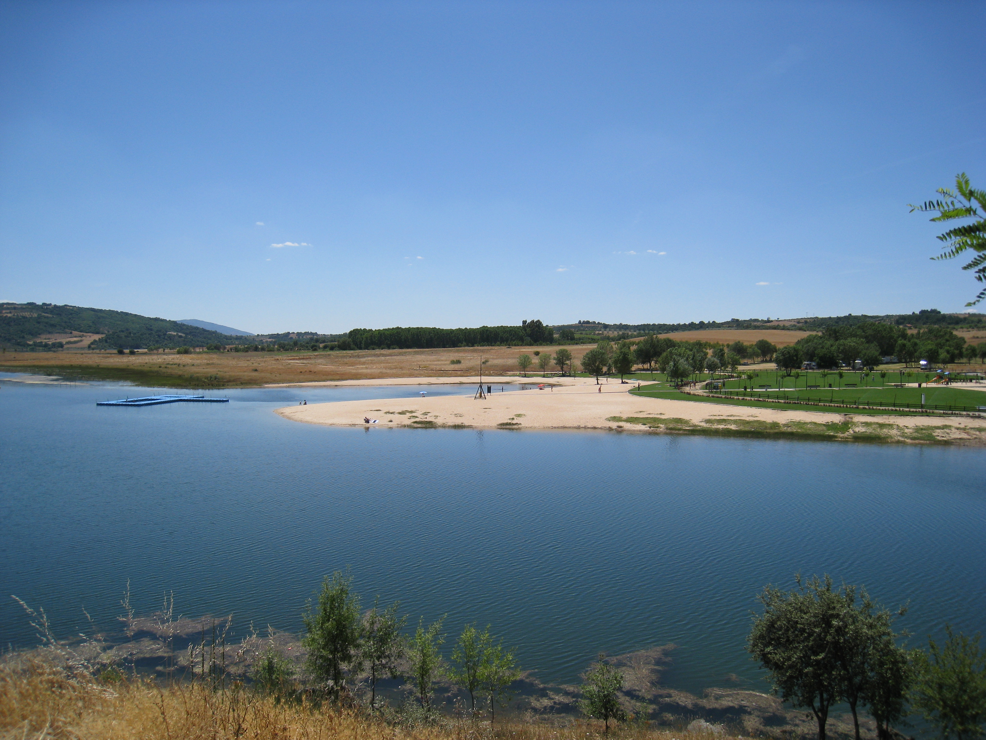 Azibo